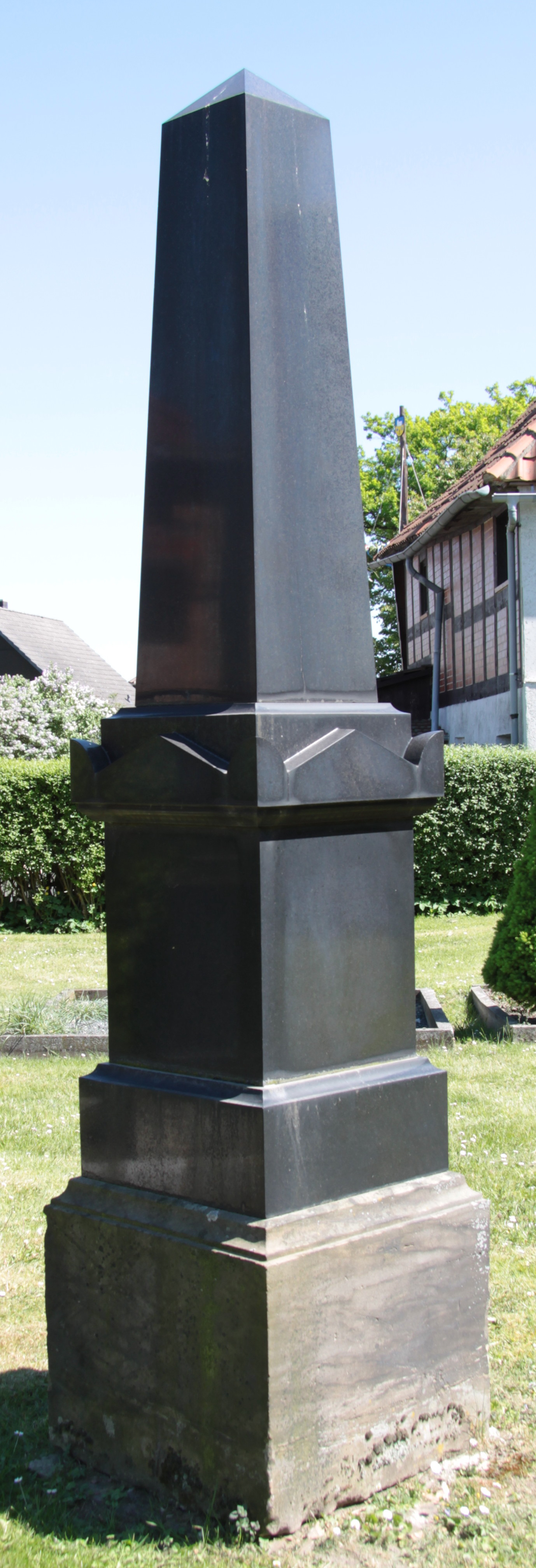 Grabmal aus Schwarz-Schwedisch, ca. 3,00 m hoch, allseits poliert, Sockel aus Sandstein (typisches Grabmal des deutschen Bürgertums ab etwa 1880)